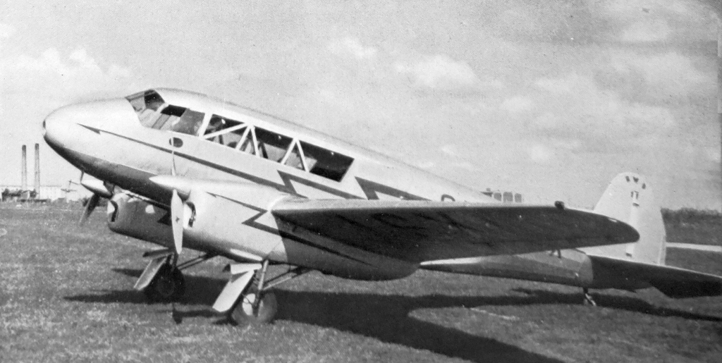 letecký motor Walter Major 6 a letoun RWD 11